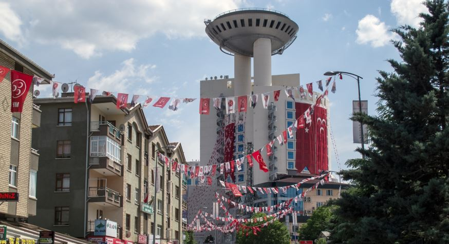 Turkish general elections, 2015